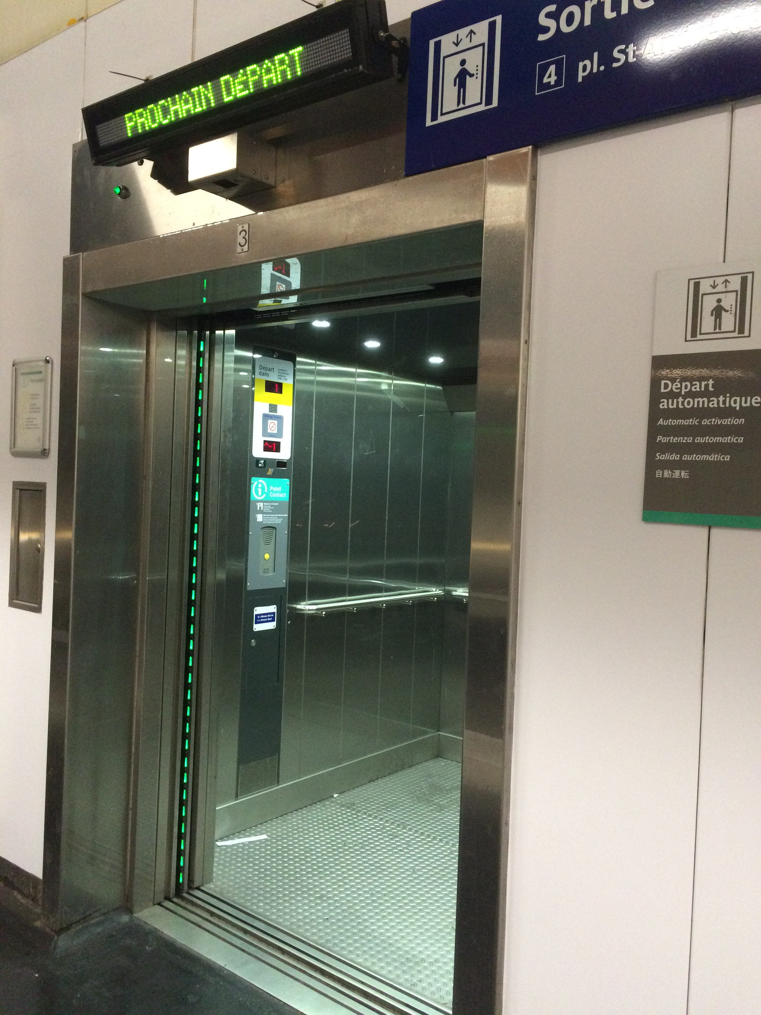 Ascenseur au départ du quai Saint-Michel de la ligne 4 du métro de Paris